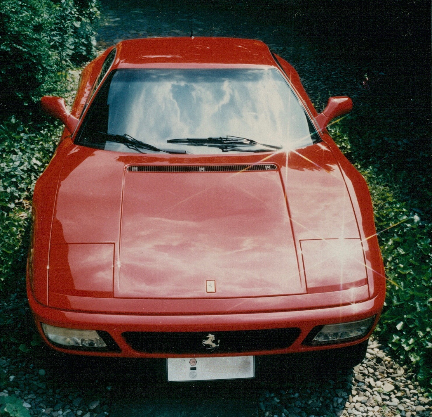 Ferrari 348tb